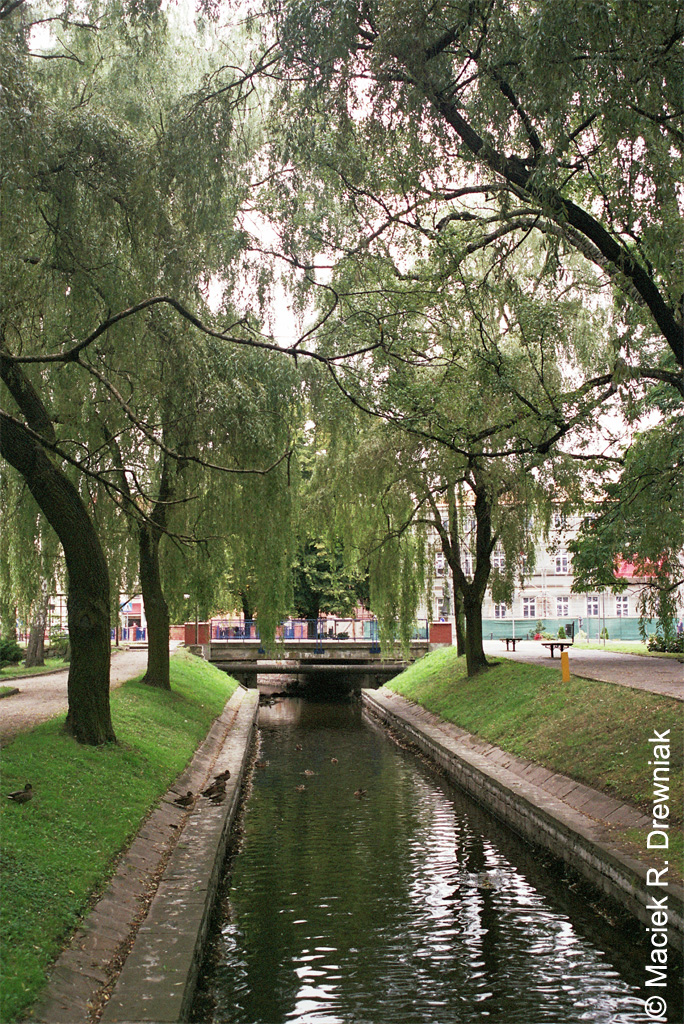 Szczecinek, ul. Mickiewicza - park miejski, 1875-1908